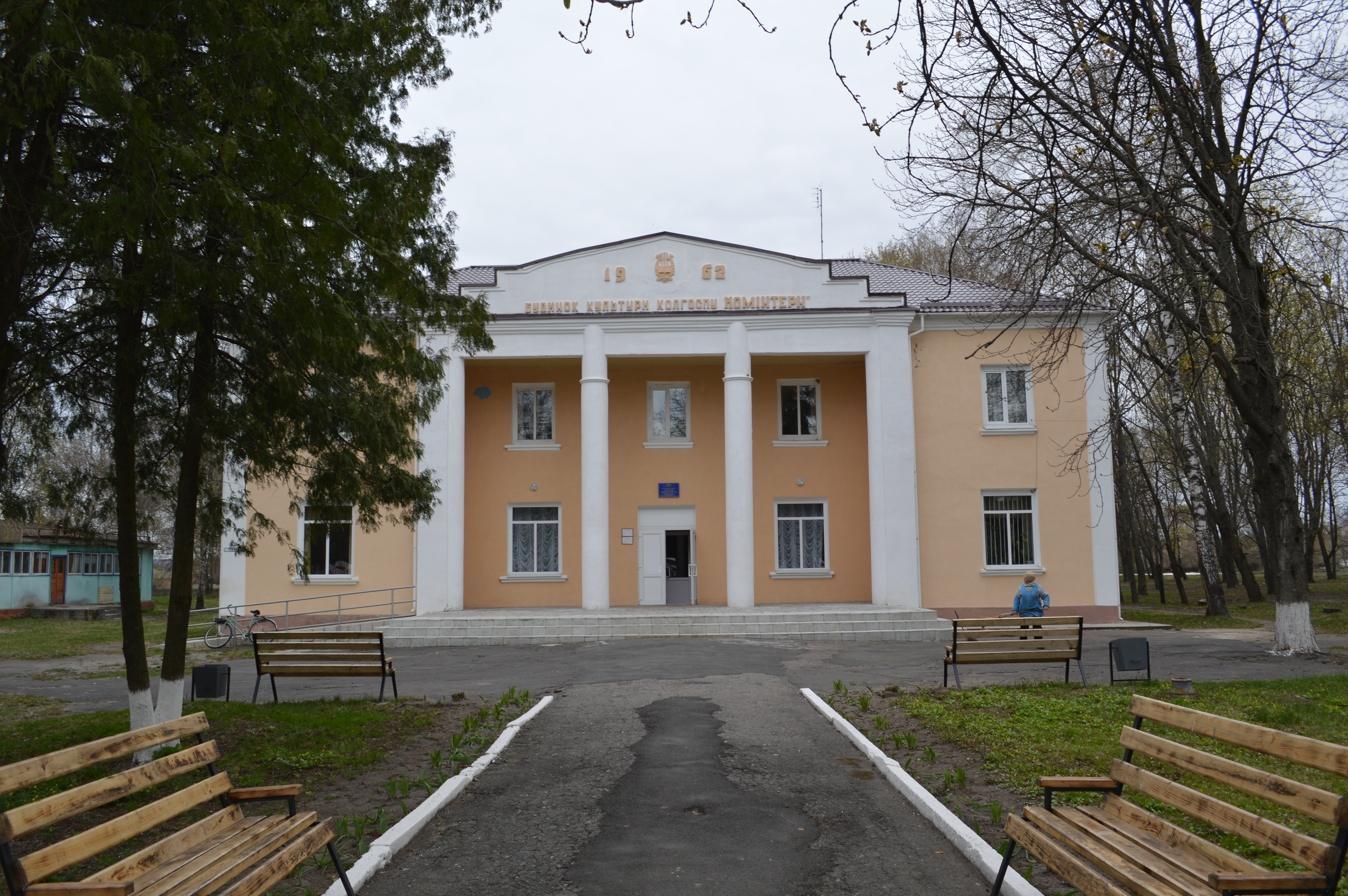 Будинок культури.